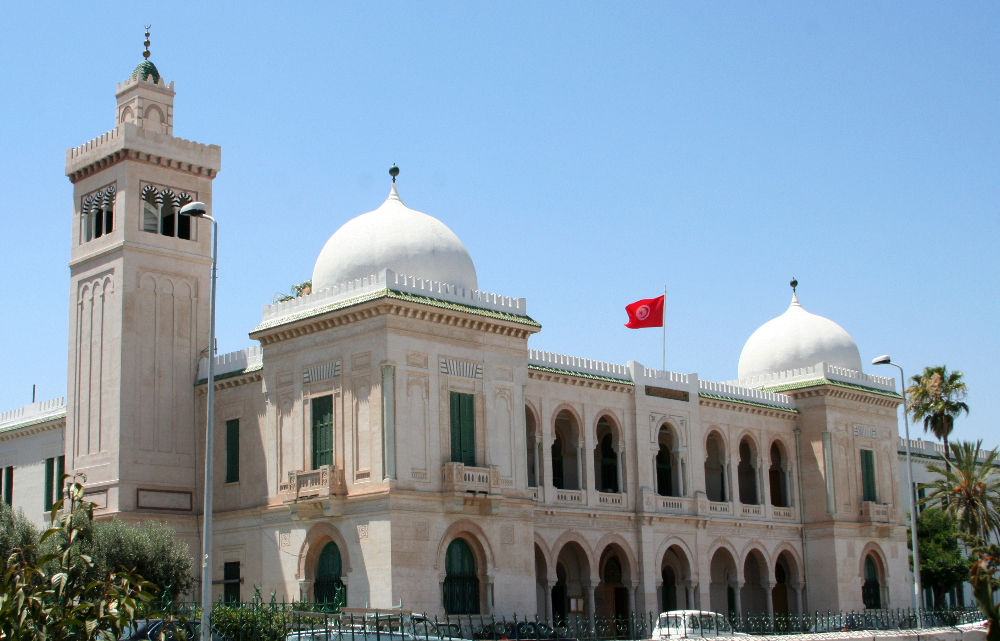 Collège Sadiki - Tunis (Tunisie)